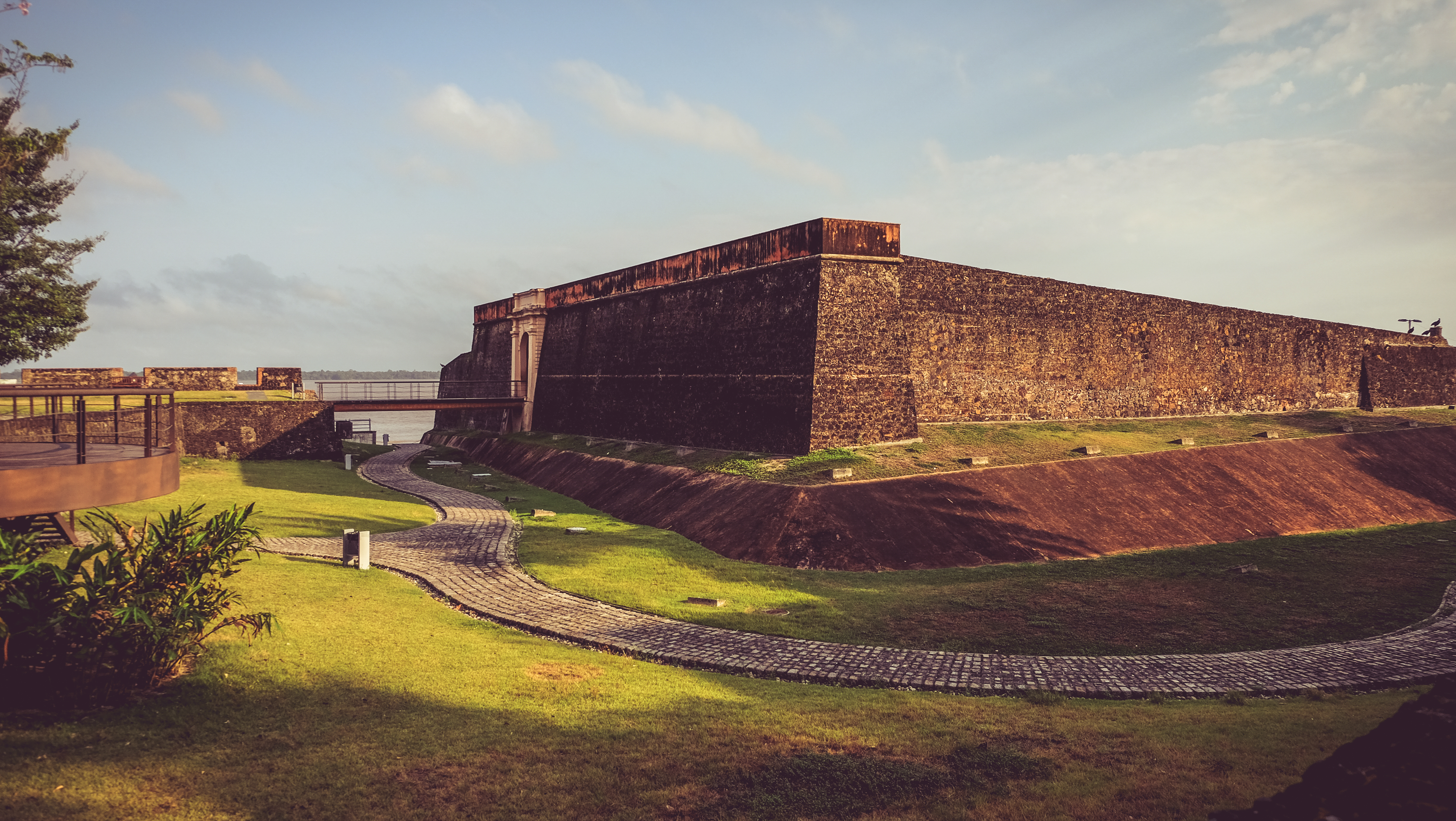 Forte do Castelo